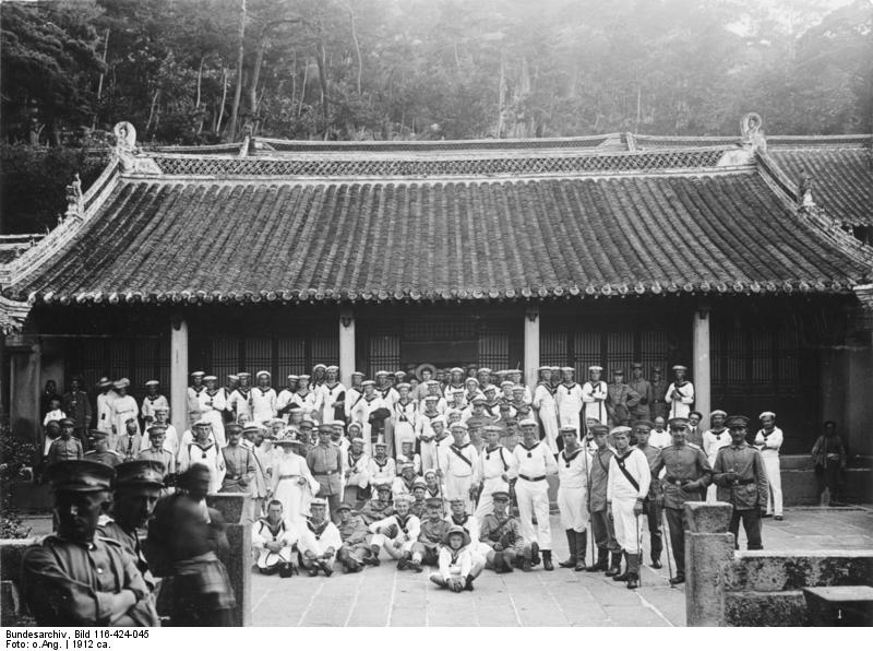 China, Tsingtau China, Tsingtau um 1912 [China, Tsingtau.- Gruppenbild von Matrosen mit Damen [Fotoalbum: Bilder aus China, von Ob.Matr.Artl. Quinten; Bem.: Originaltitel z.T. inkorrekt